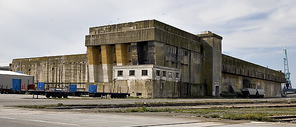 Base sous marine (WWII) du port de La Pallice vue Nord-Est. Pep.per de Ré Photo issue de ma banque d'images